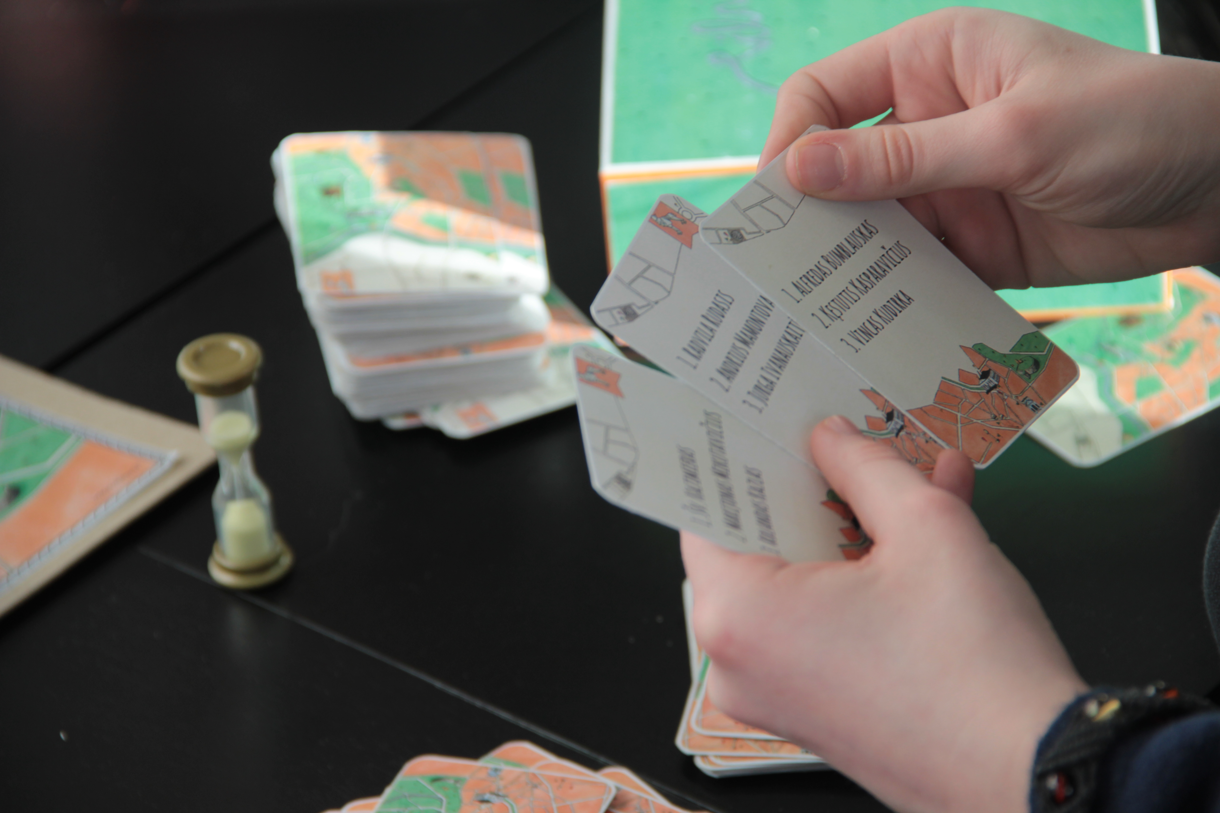 Stalo žaidimas „Pasižvalgymai po Vilnių“. Autorės: Justina Juciūtė, Giedrė Narbutaitė. Sukurtas 2016 m.